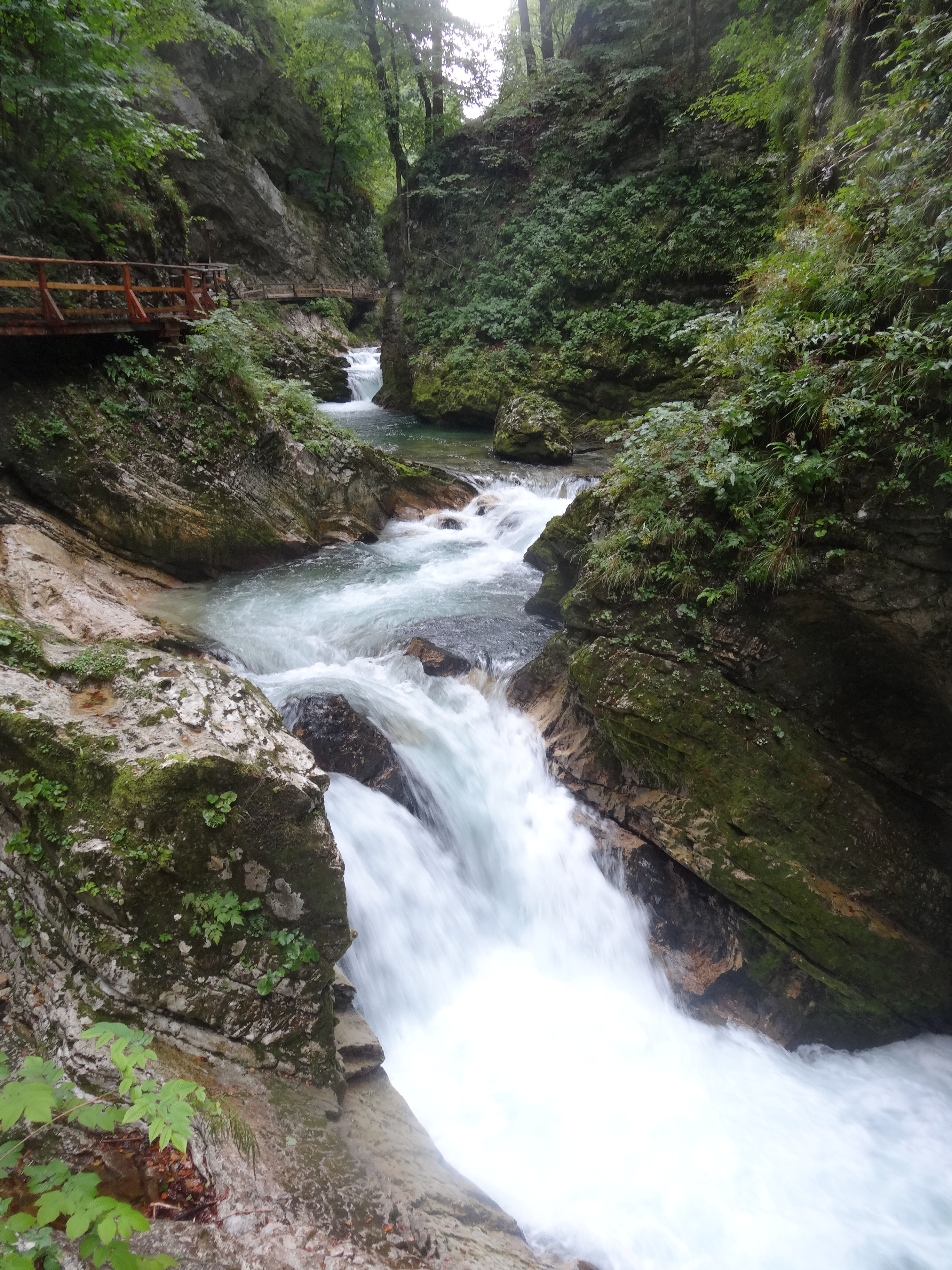 Gorges de Vintgar, Eslovènia (agost 2013)